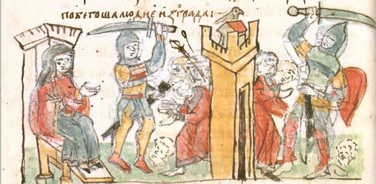 Знищення древлянської столиці Іскоростеня за наказом княгині Ольги. Опис події за 946 рік в Повісті временних літ: «Ольга ж кожному із воїв по голубу роздавала, в іншим — по горобцю. І звеліла кожному голубові і горобцю чір прив’язати в в шматки тканини огортати, в ниткою голубам і горобцям в’язати. І як смеркло, Ольга своїм воям повеліла голубів і горобців пустити. Голуби ж і горобці в свої гнізда полетіли: Одні в голубники свої, горобці ж — під стріхи. І так загорілись голубники, і від них спалахнули кліті і одрини, і не було двору, де б не горіло, і не можна було гасити, бо усі двори загорілися. І побігли люди із города, і звеліла Ольга воям своїм хапати їх. І коли взяла город — спалила його, і старійшин же города спалила, і інших людей тих перебила, а інших в рабство мужам своїм віддала».